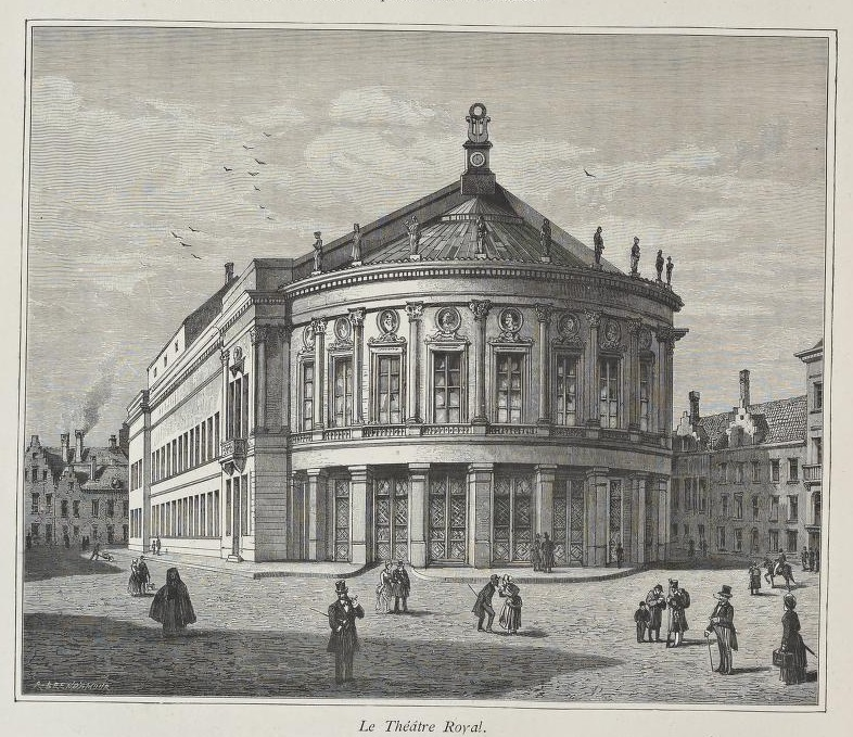 Ex Catalogus